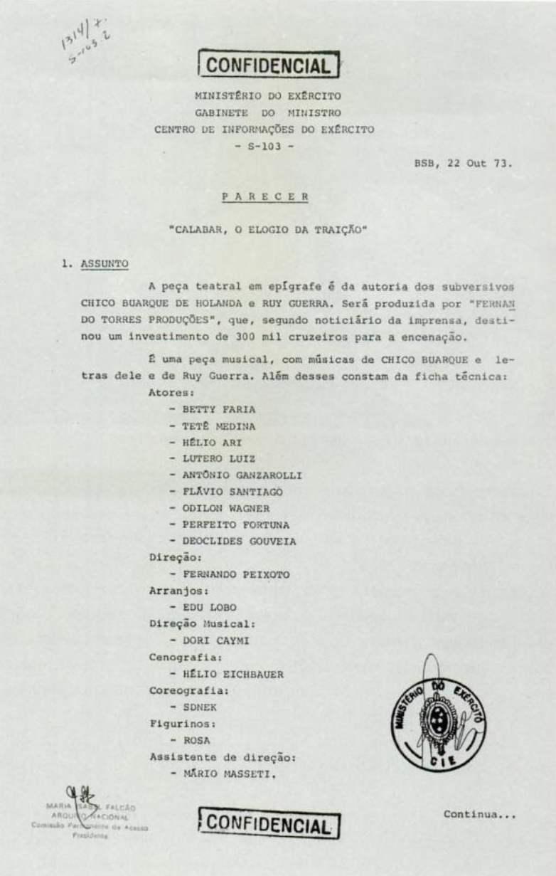 Parecer do Centro de Informações do Exército sobre a peça teatral Calabar: o Elogio da Traição.